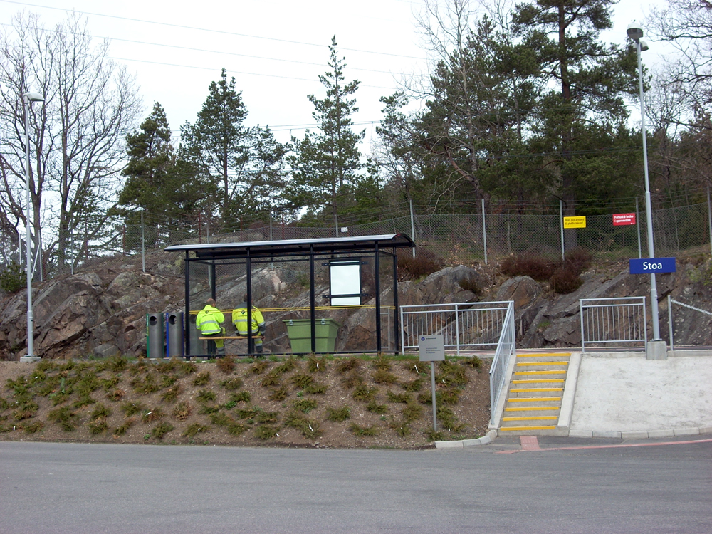 Stoa holdeplass på Arendalslinjen.